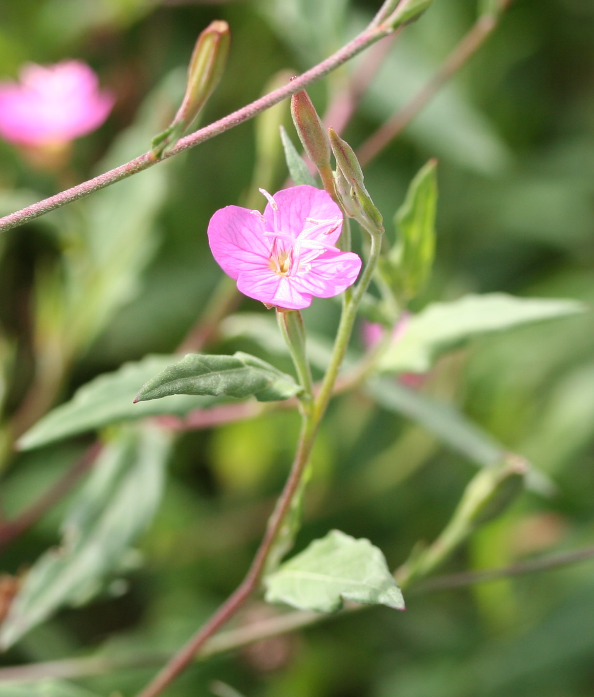 Oenothera rosea im Botanischen Garten Dresden